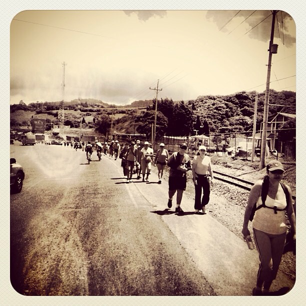 En el alto de Ochomogo, personas con fe en la Virgen de los Ángeles. Caminan todos los años en la víspera de su aparición el 1 de agosto de cada año. Las caminatas se dan de todos los puntos del país hasta la Catedral de Cartago. La camina es para agradecerle a la virgen, o bien para hacer ofrecimientos.